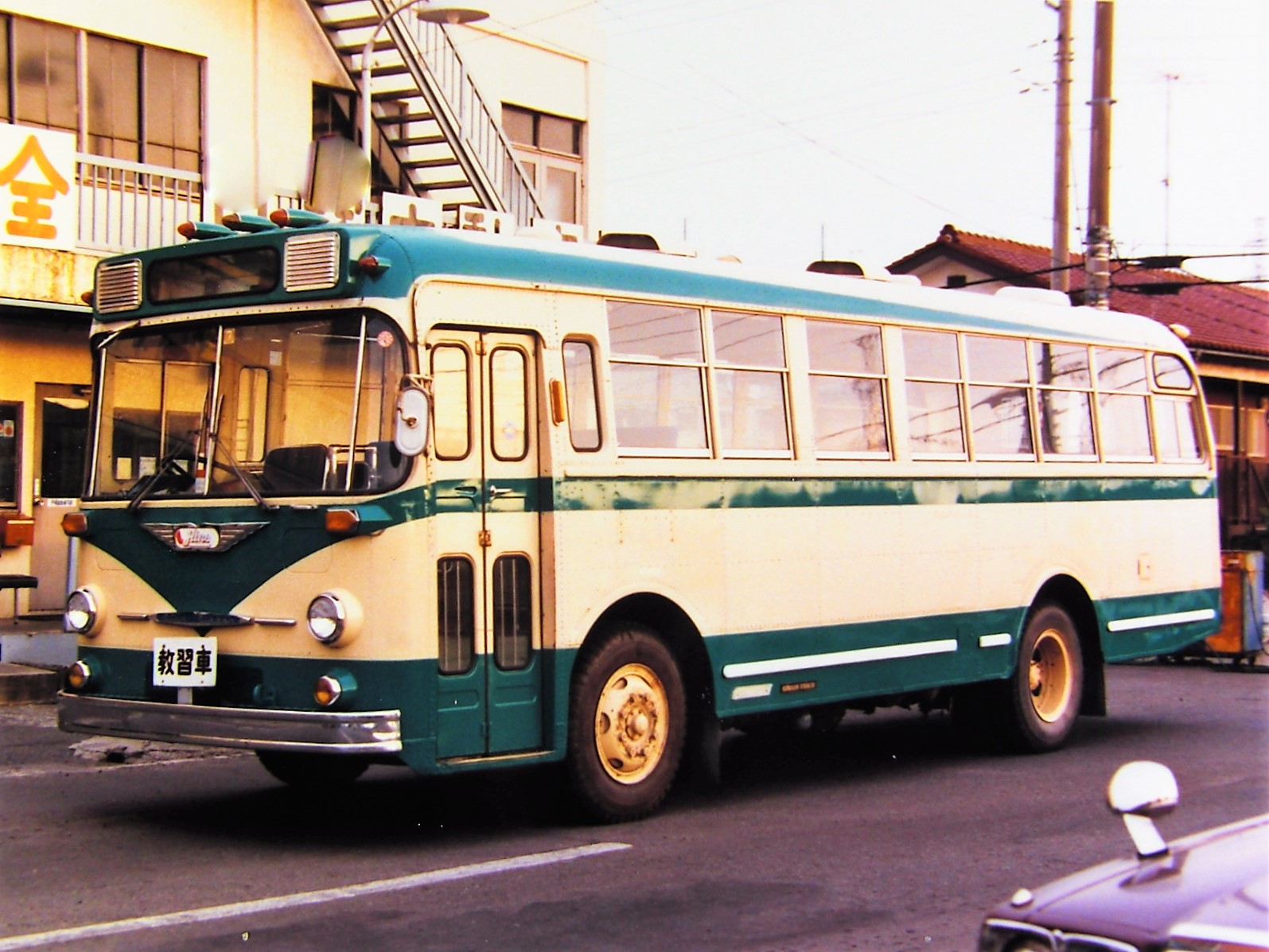 日野BT51形バス 1967年式 元信南交通 1986年撮影